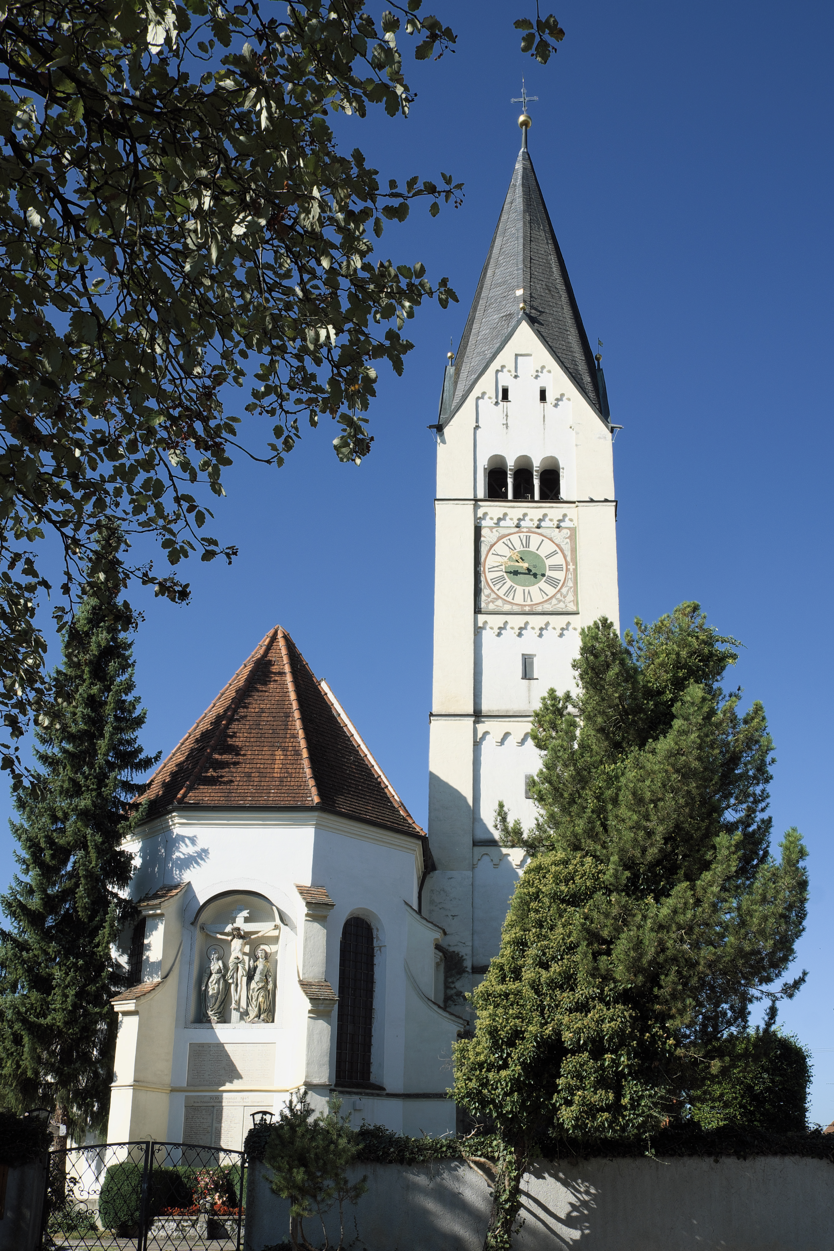 Katholische Pfarrkirche St. Martin in Jengen im Landkreis Ostallgäu (Bayern/Deutschland)